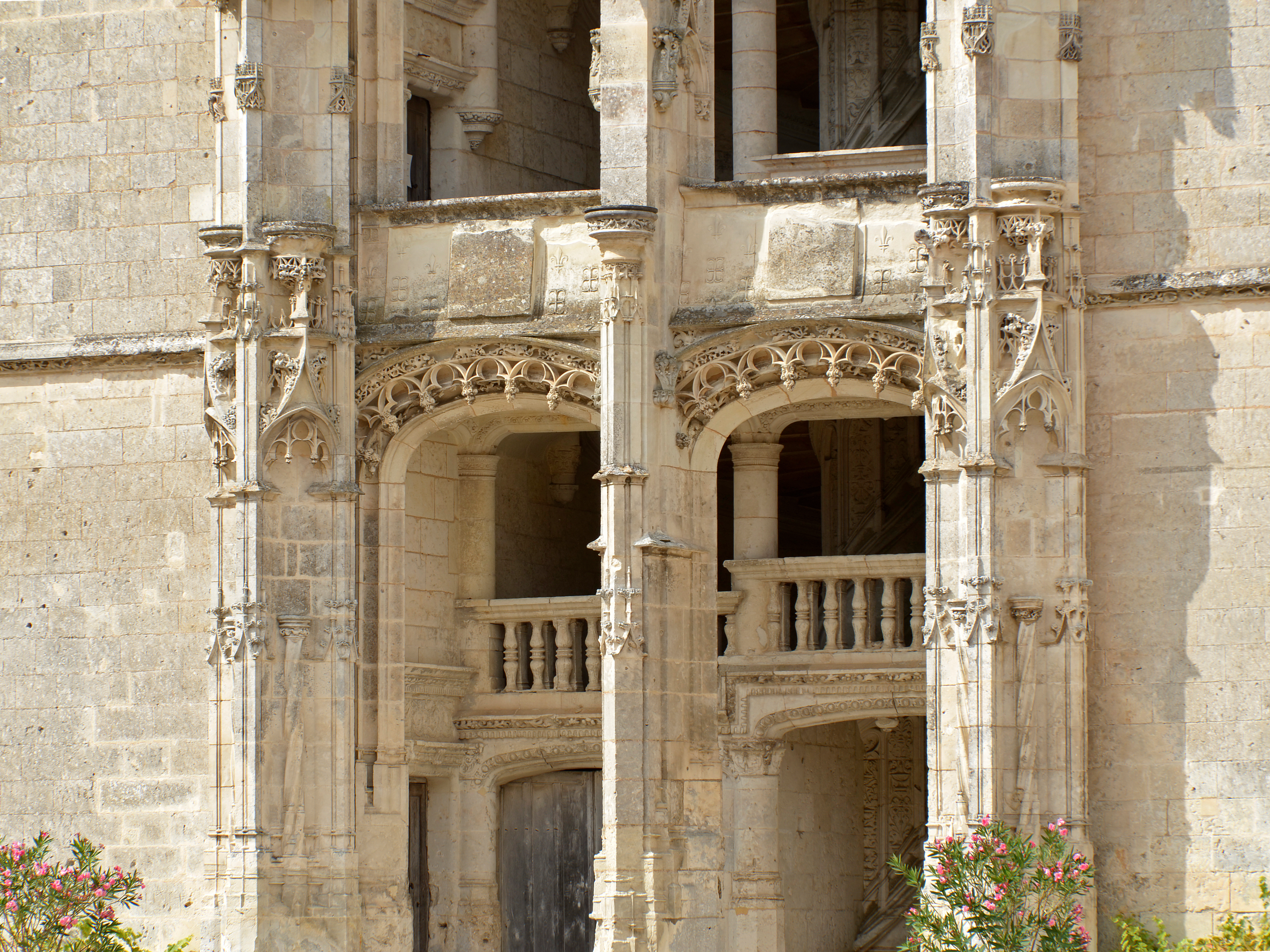 Château de Châteaudun - Eure-et-Loir .